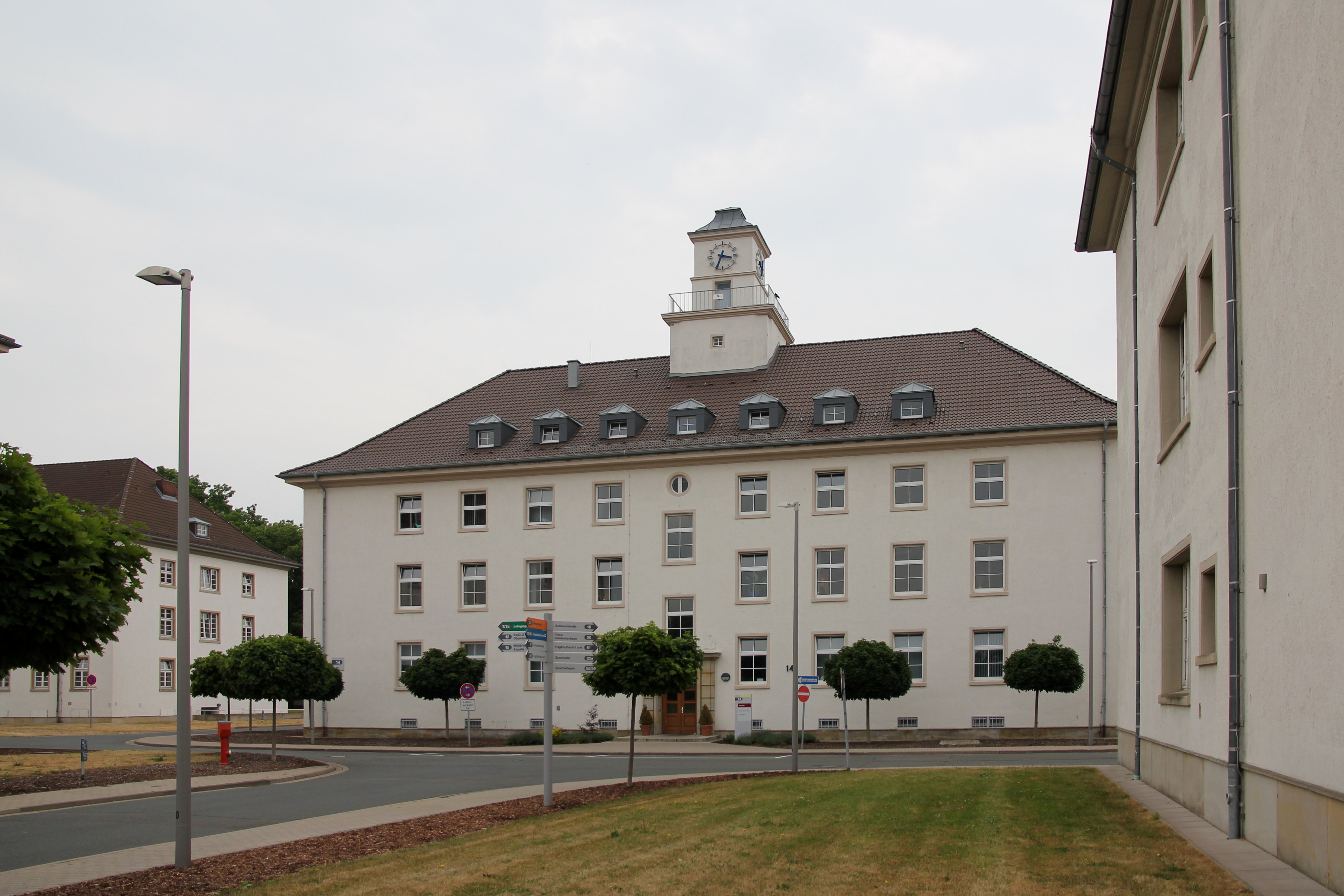 Gebäude 14 der Emmich-Cambrai-Kaserne in Hannover, aufgenommen am Tag der Bundeswehr 2015. Sitz von Schulstab, Schulkommandeur und Personalrat der Schule für Feldjäger und Stabsdienst der Bundeswehr.